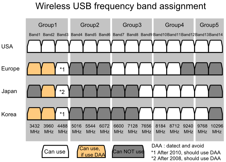 הקצאת תדרים ל-Wireless USB באזורים שונים בעולם.